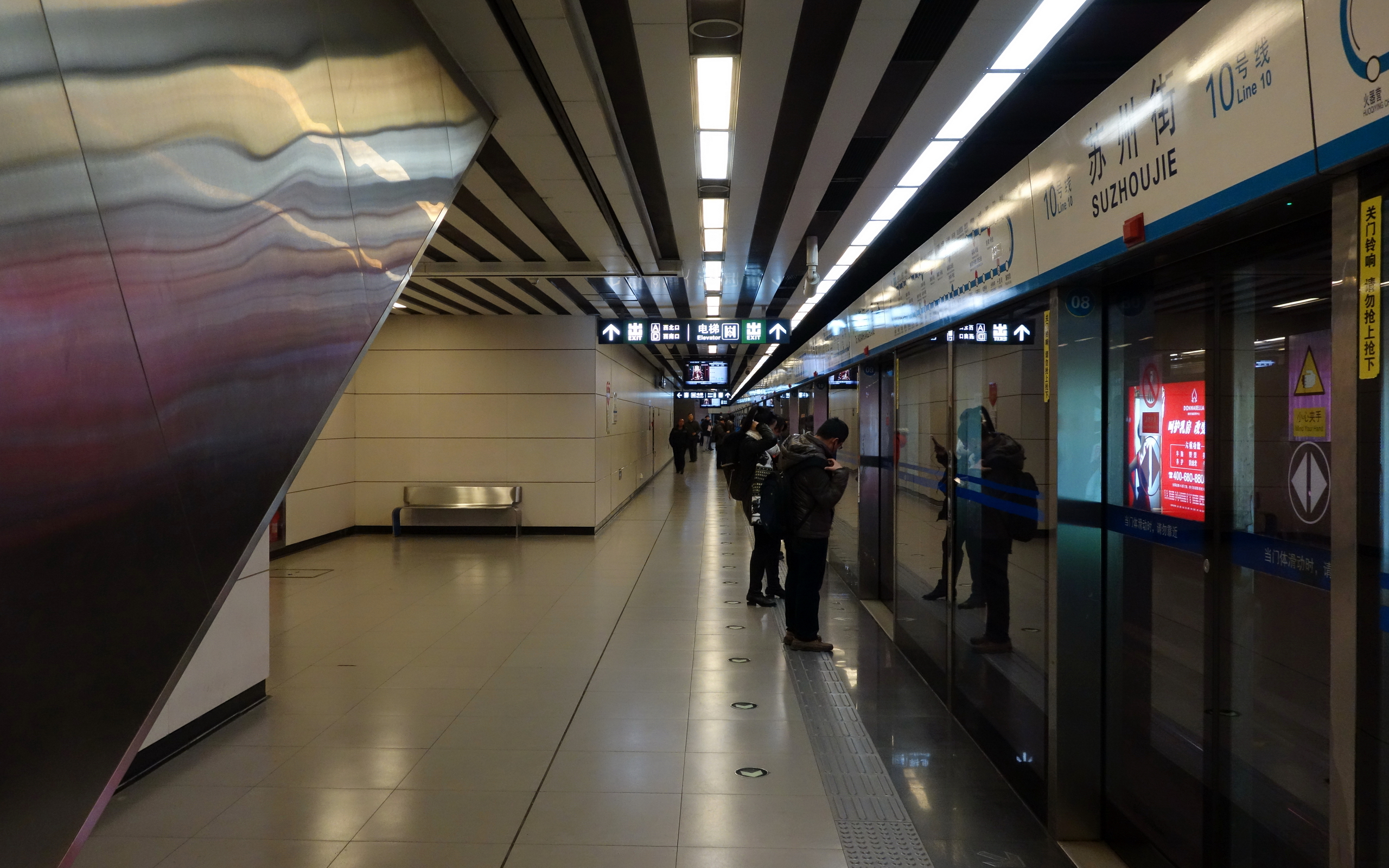 北京地铁10号线苏州街站侧式站台